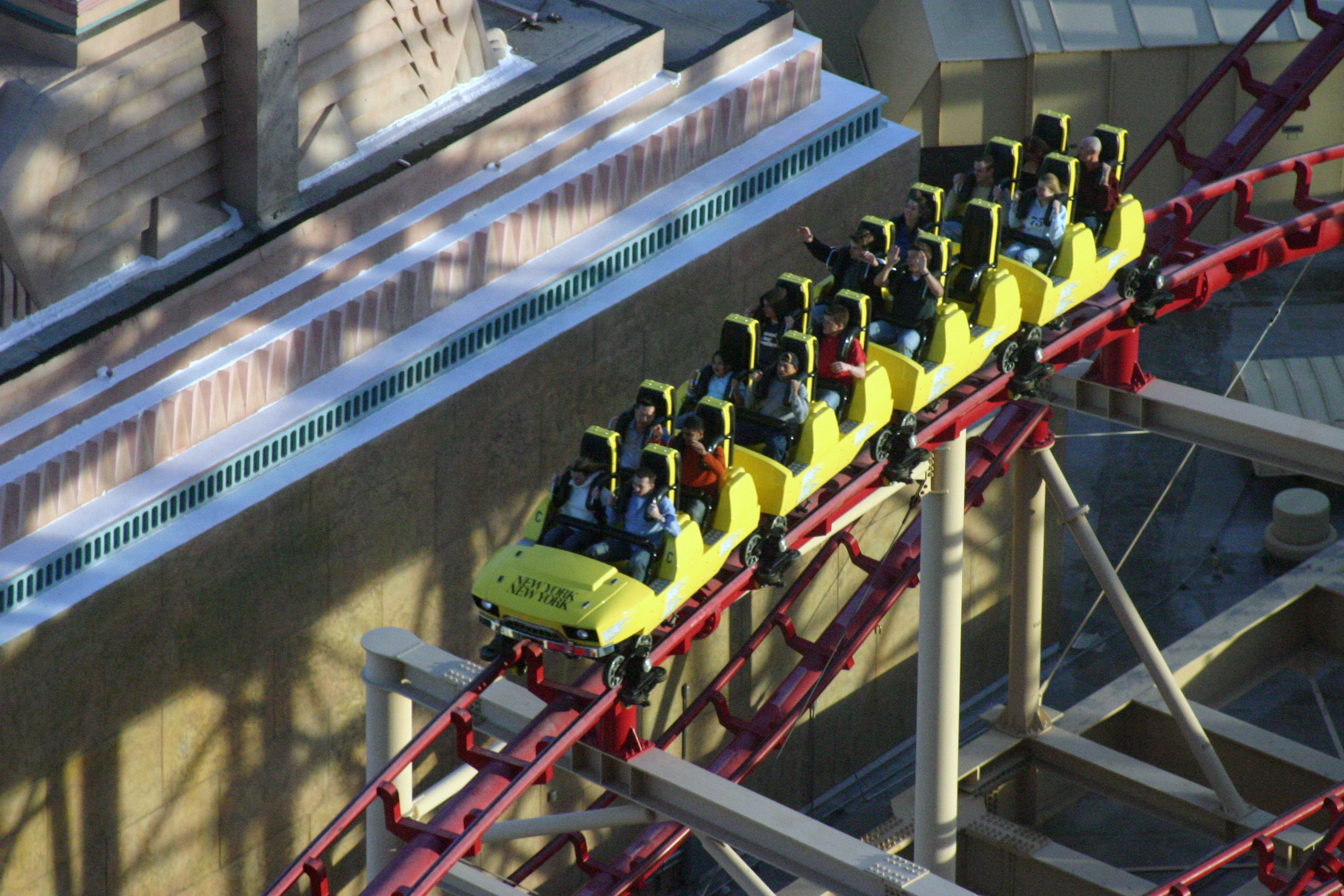 NY-NY RollercosterManhattan Express